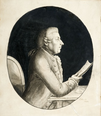 Auf der Seite erfurt.de und mit einem Copyright-Vermerk des Angermuseums in Erfurt wurde diese nur gering aufgelöste und nur klein wiedergegebene zweidimensionale Reproduktion einer nicht mehr dem Urheberrecht unterliegenen Darstellung wie folgt untertitelt: „Franz Kotta (Veilsdorf / Hildburghausen 1758–1821 Rudolstadt), Bildnis des Kaufmanns Christian Nonne, 1785, Tuschzeichnung.“ Dass unsere Museen auch anders, zum Wohle der Allgemeinheit und im Sinne der Allgemeinbildung, könnten, läßt sich beispielsweise an einer ebenfalls das Leben von Christian Nonne betreffenden, hochaufgelösten Fotografie eines dreidimensionalen Porzellan-Objektes im wahrsten Sinne des Wortes erkennen: So hat das in Stockholm beheimatetet Hallwyl Museum mit ihrem Fotografen Jens Mohr in Kooperation mit der Wikimedia Schweden zum Beispiel gestiftet ...